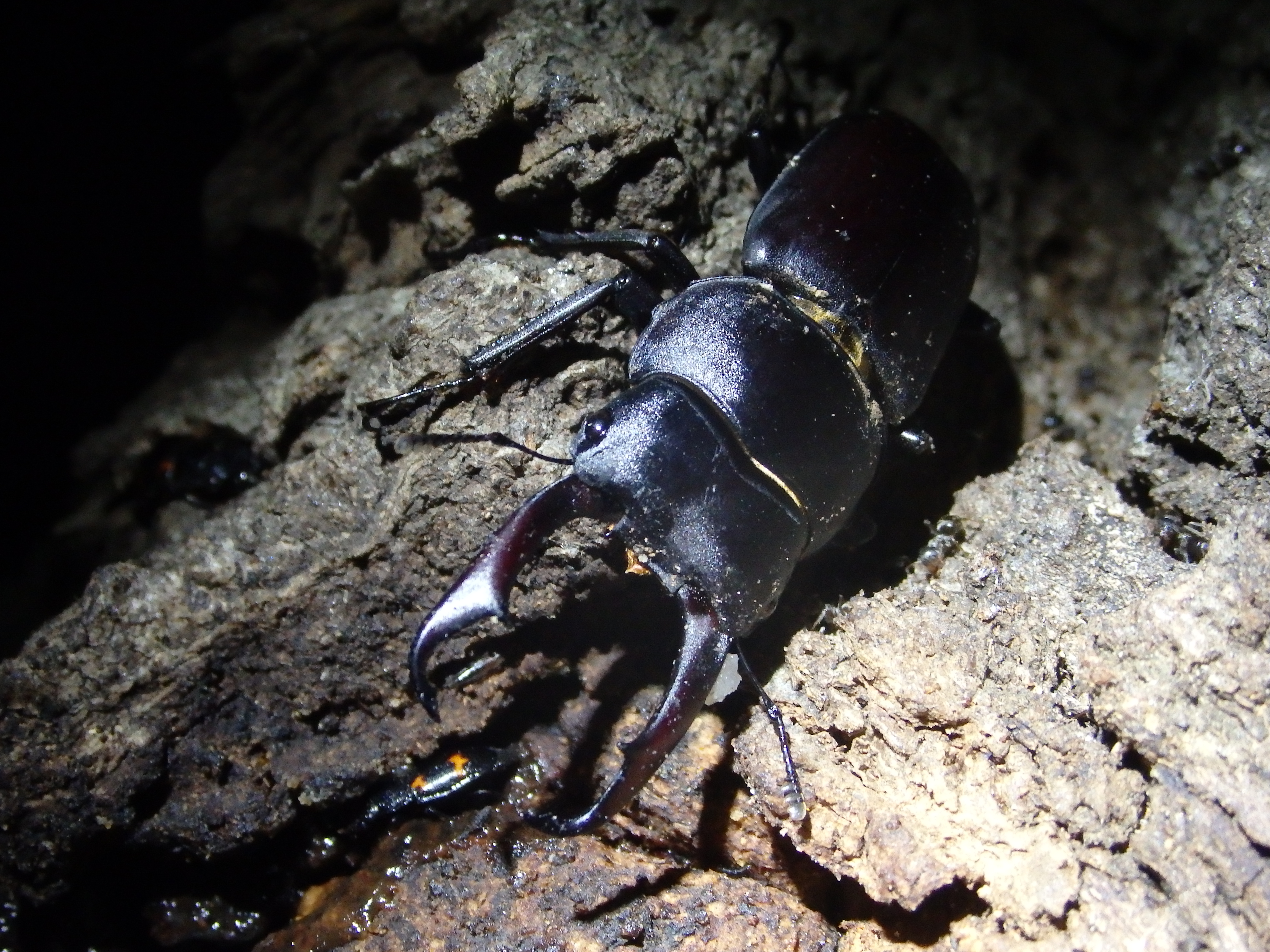 コクワガタ♂４５ミリ 大アゴのアップ